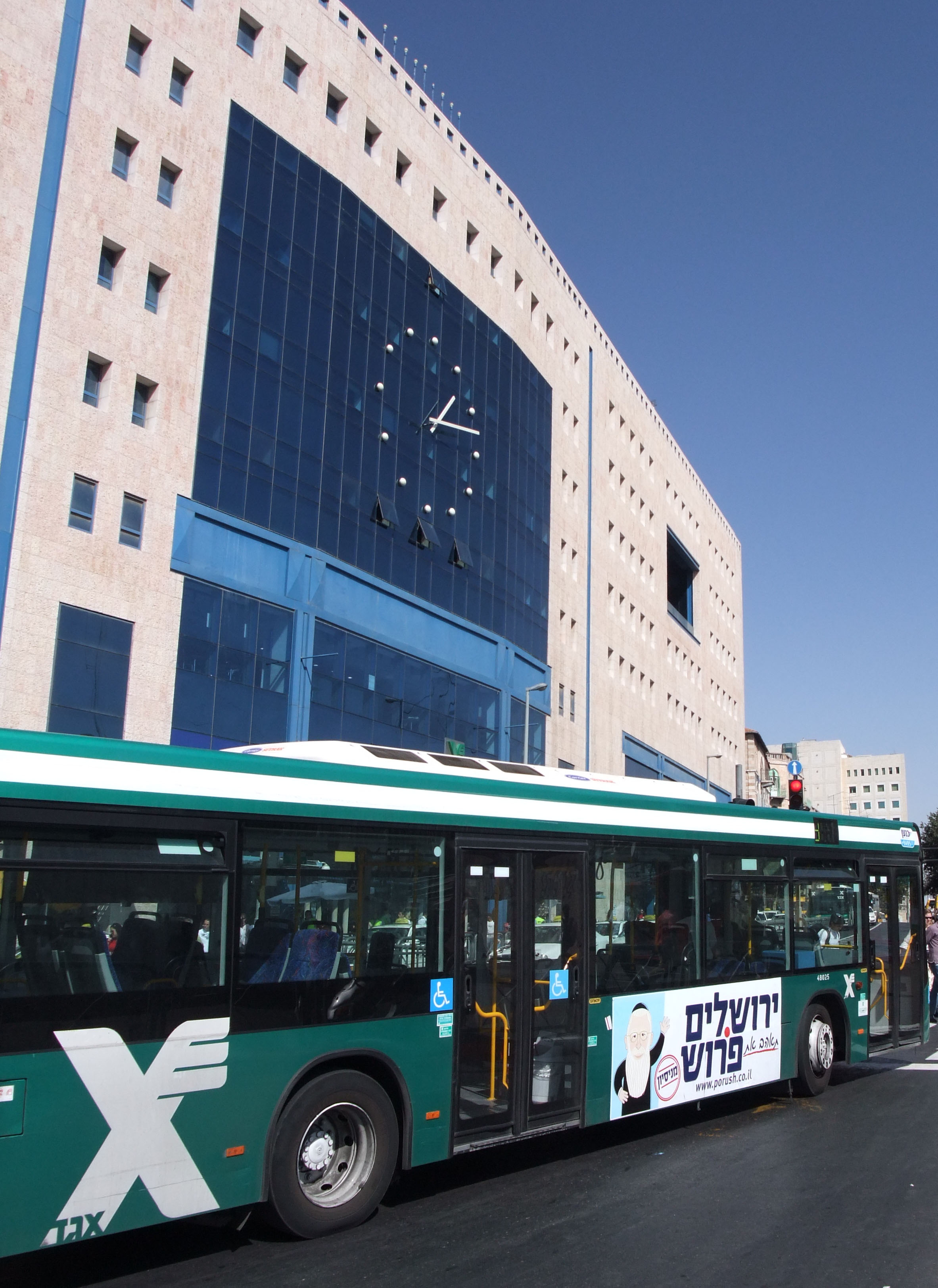 תעמולה של פרוש על אוטובוס בירושלים במהלך המירוץ לראשות העירייה בשנת 2008